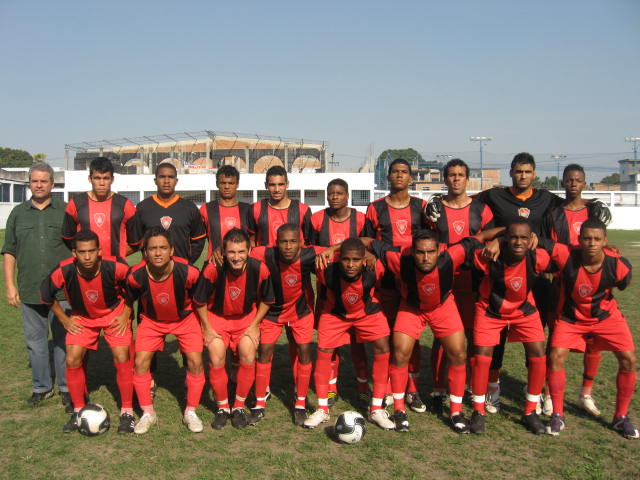 Equipe do Rubro Social Esporte Clube, da Terceira Divisão do Rio de Janeiro, perfilada, em 2009